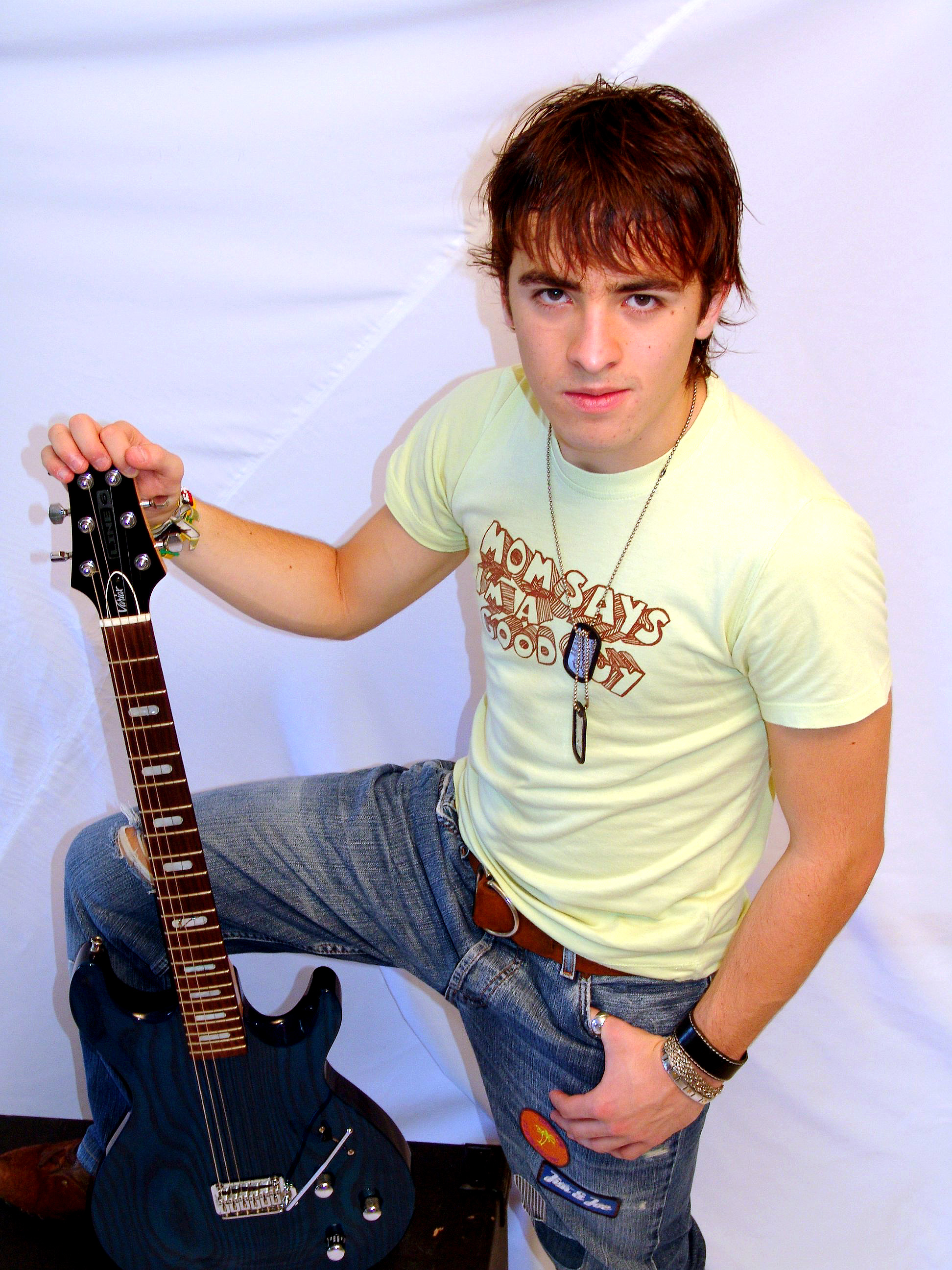 Martín Ricca no Brasil em 2006.